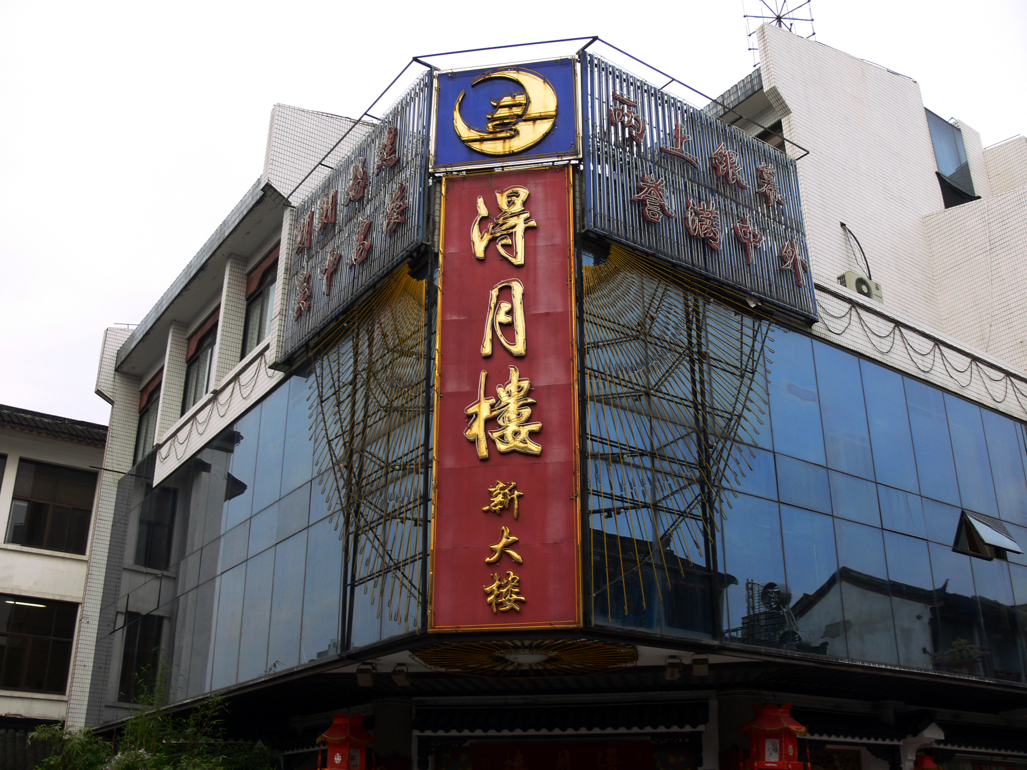 Suzhou Deyuelou restaurant 苏州得月楼